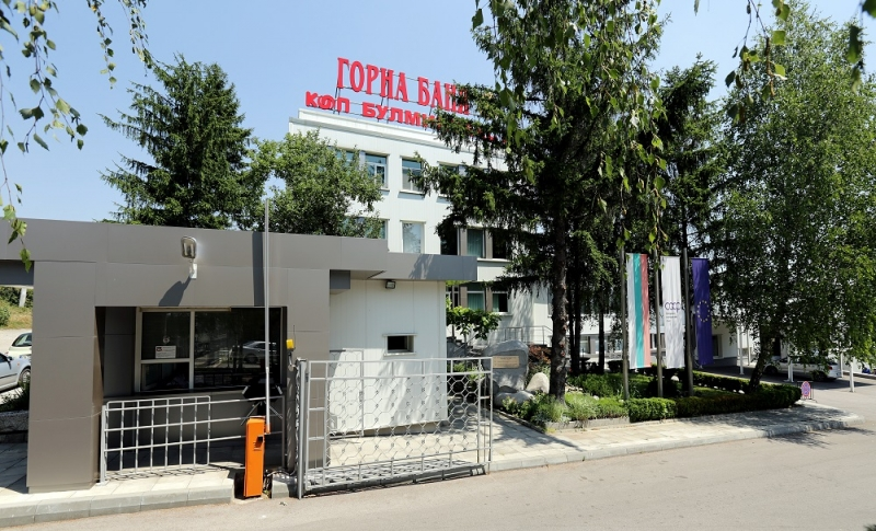 Завод на минерална вода "Горна Баня 1"